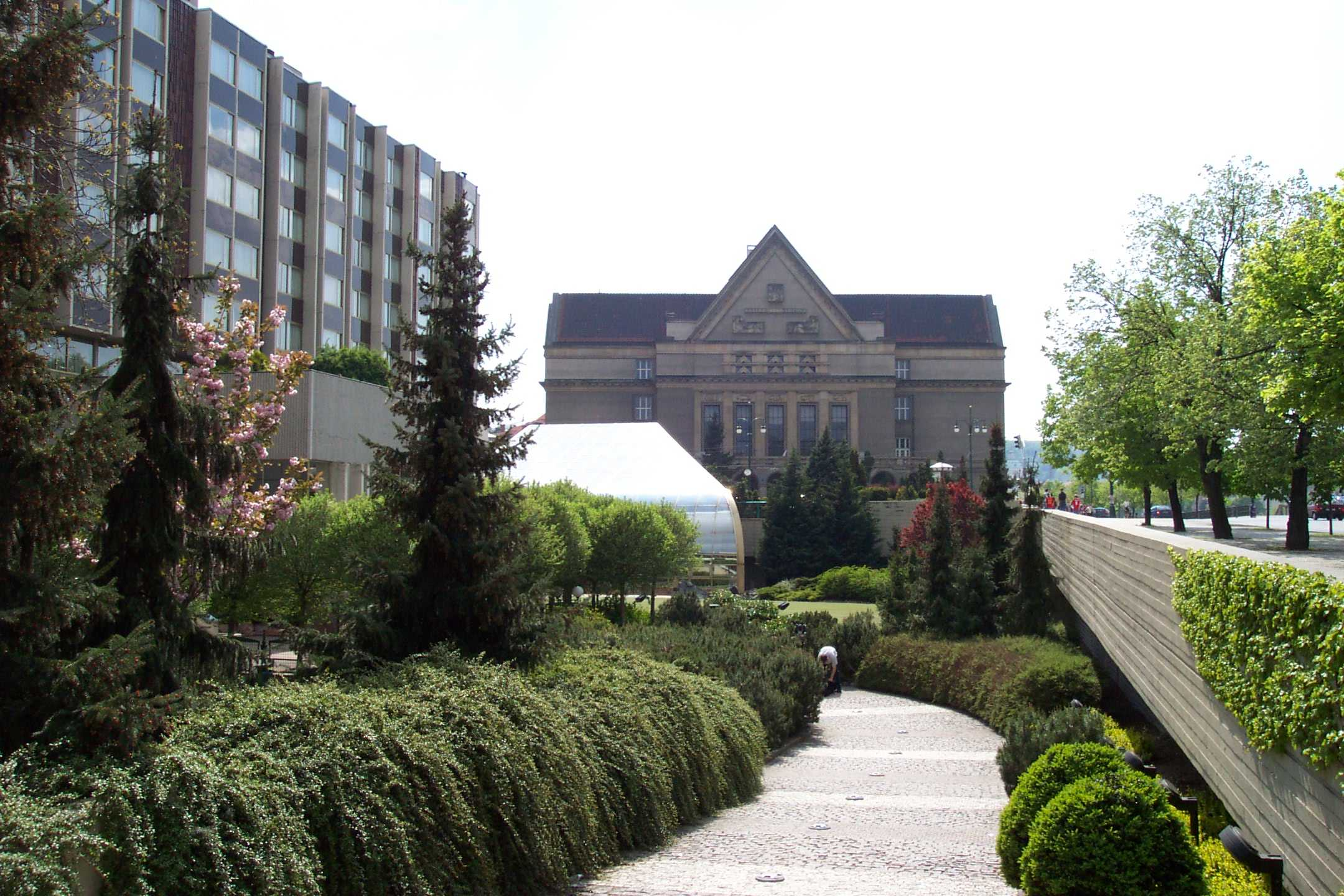 Faculty of Law in Prague - Právnická fakulta v Praze. architekt: Jan Kotěra